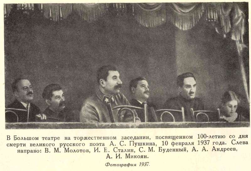 Руководители СССР на торжественном заседании, посвящённом 100-летию со дня смерти Пушкина